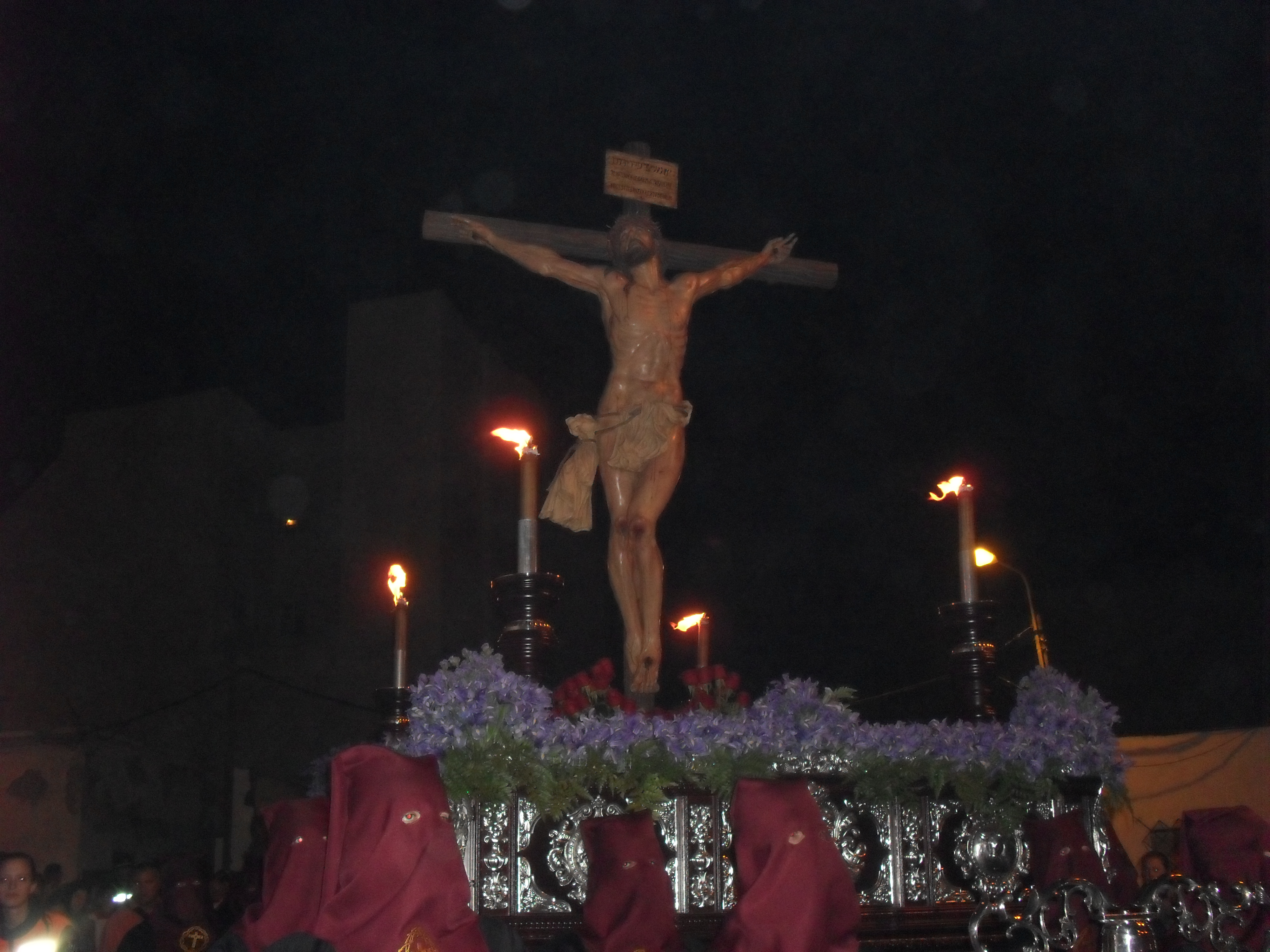 Procesión del Stmo. Crsto de la Expiración en Roquetas de Mar